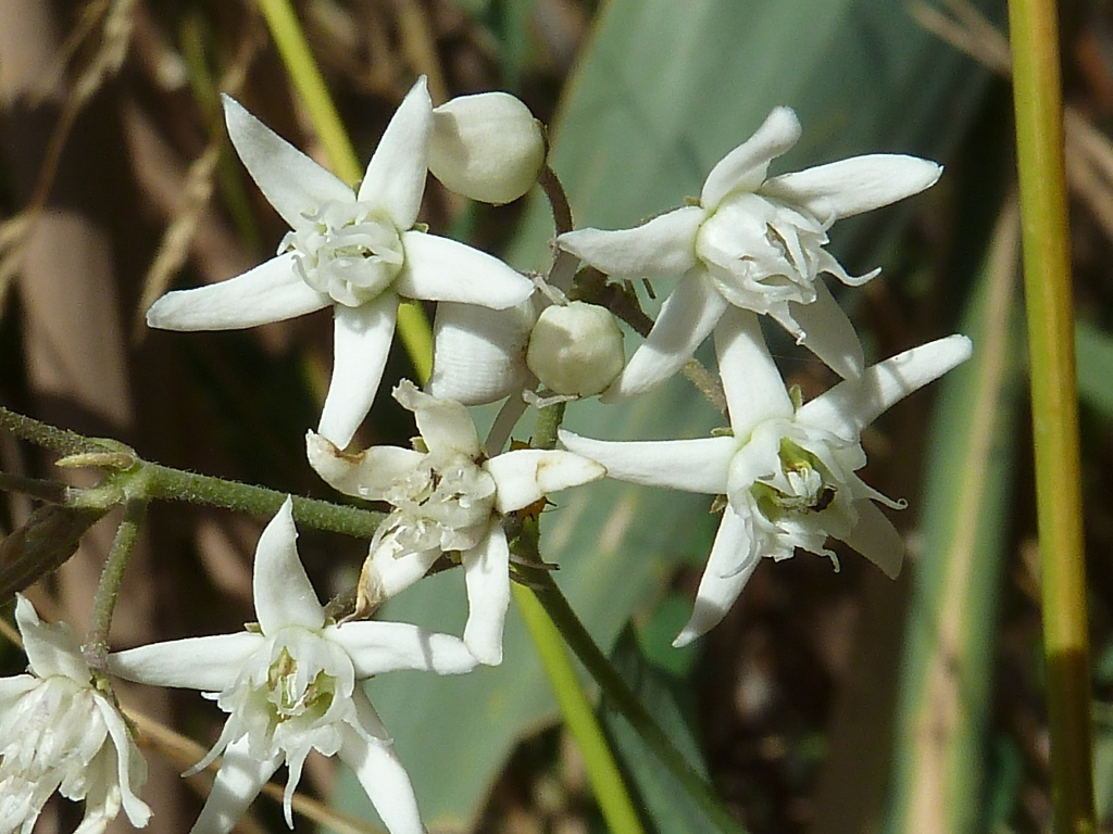 Cynanchum acutum (Matacán): inflorescencia - La Huerta/Camino de la Azarbe de Patricio - Albatera (Alicante, España).